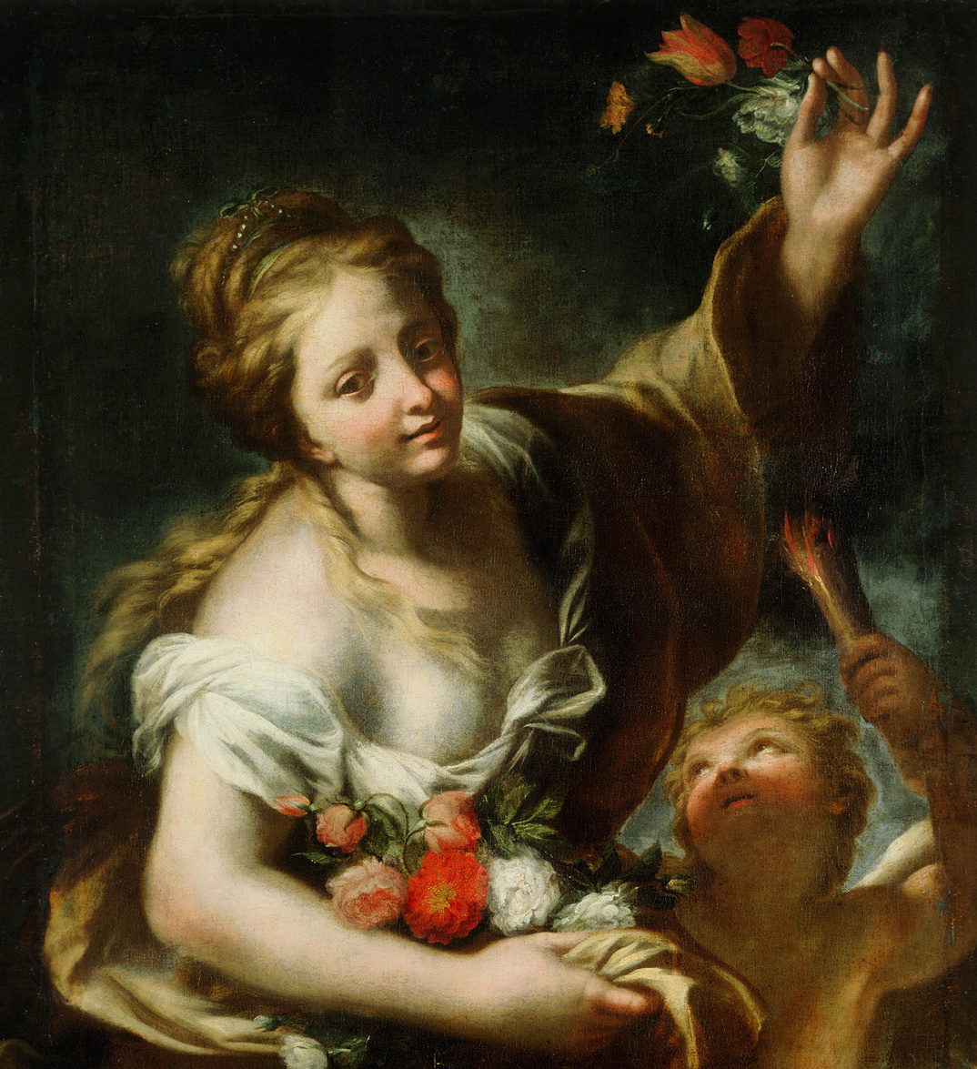 Aurora